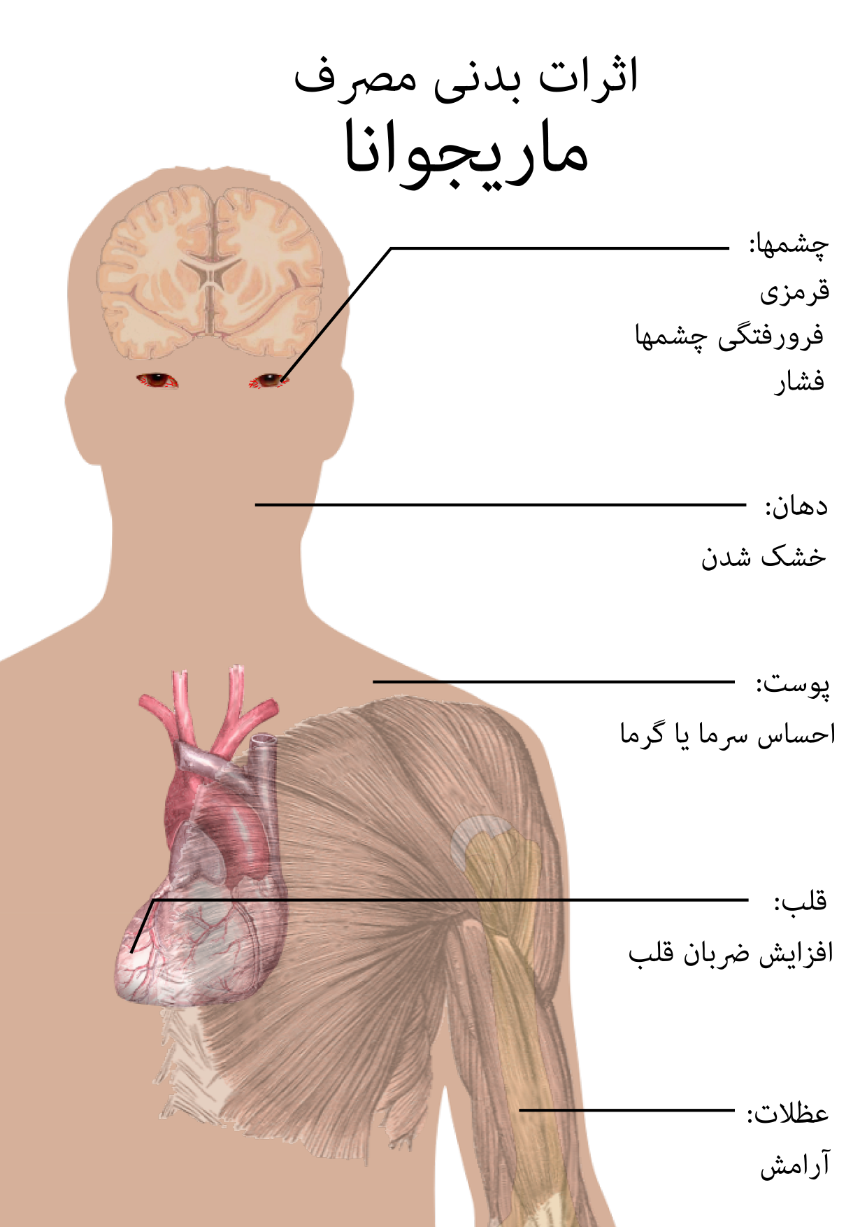 تاثیرات دنی ماری‌جوانا